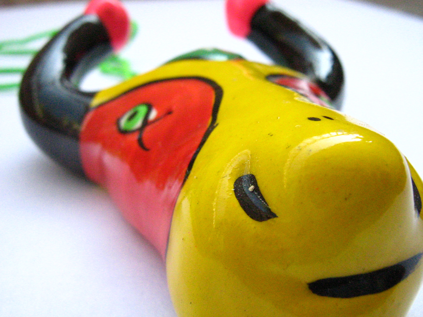 Carnaval de Barranquilla